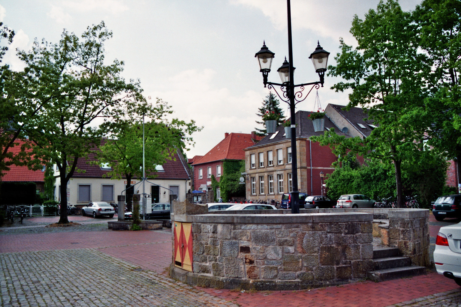 Burgplatz Bevergern, Nordrhein-Westfalen, Deutschland.